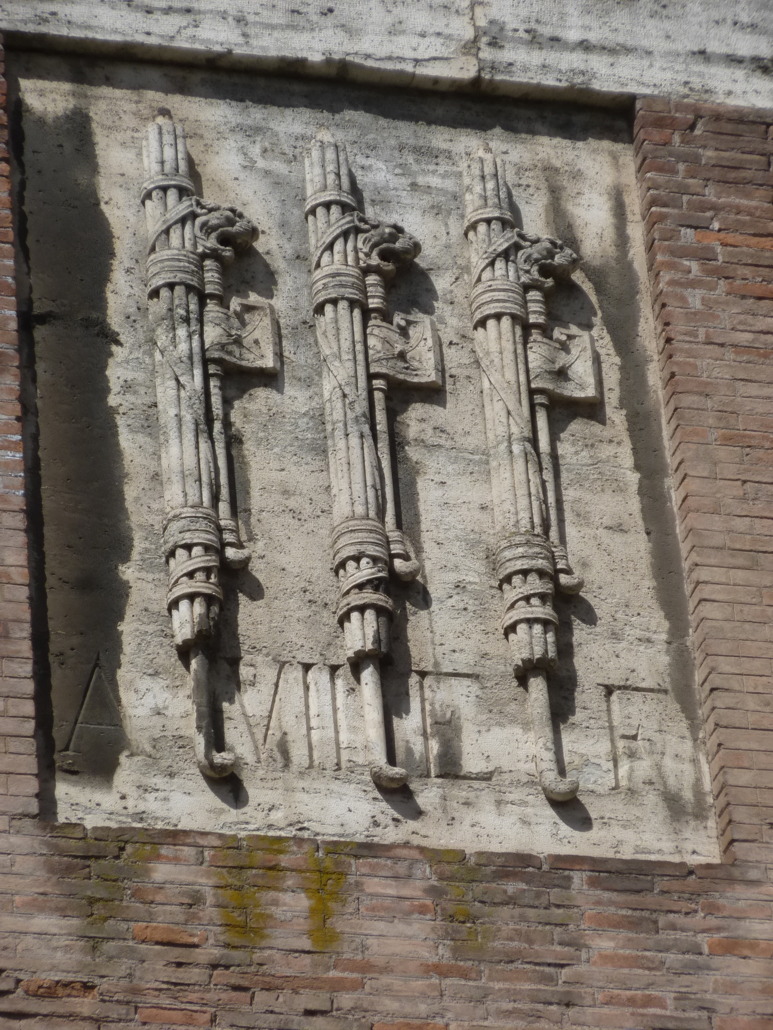 Roma, teatro di Marcello. Bassorilievo di fasci murato nello sperone di sostegno in memoria delle demolizioni del 1926-32. Nell'epigrafe si legge A[nno] VII E[ra] F[ascista] (1929).